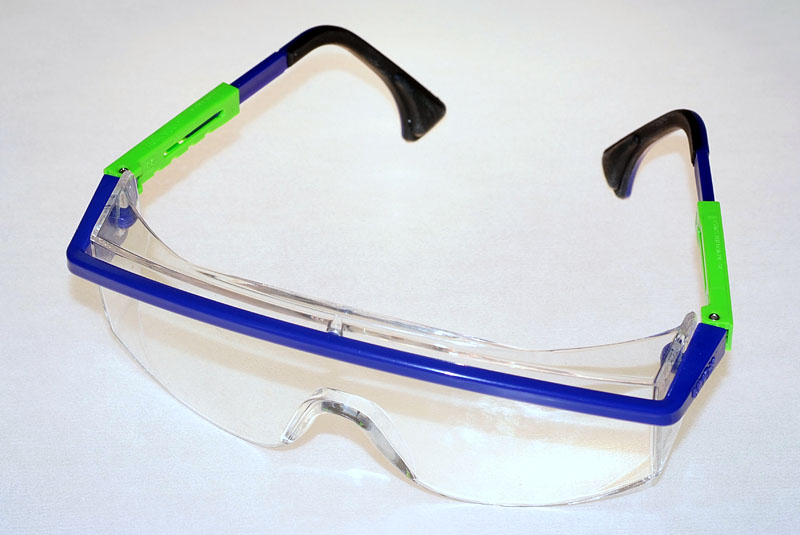 en: goggles / de: Schutzbrille